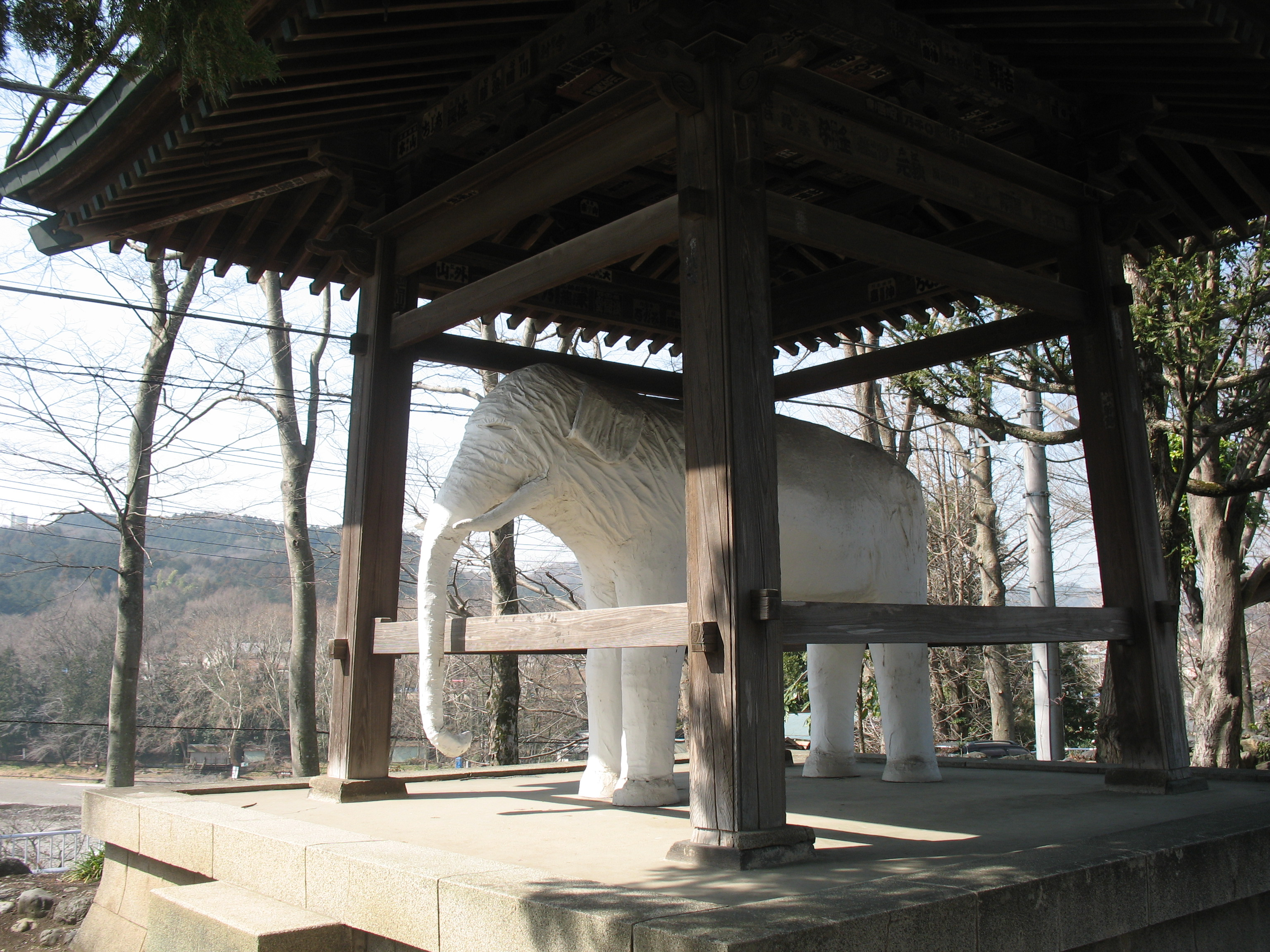 飯能市観音寺の白象